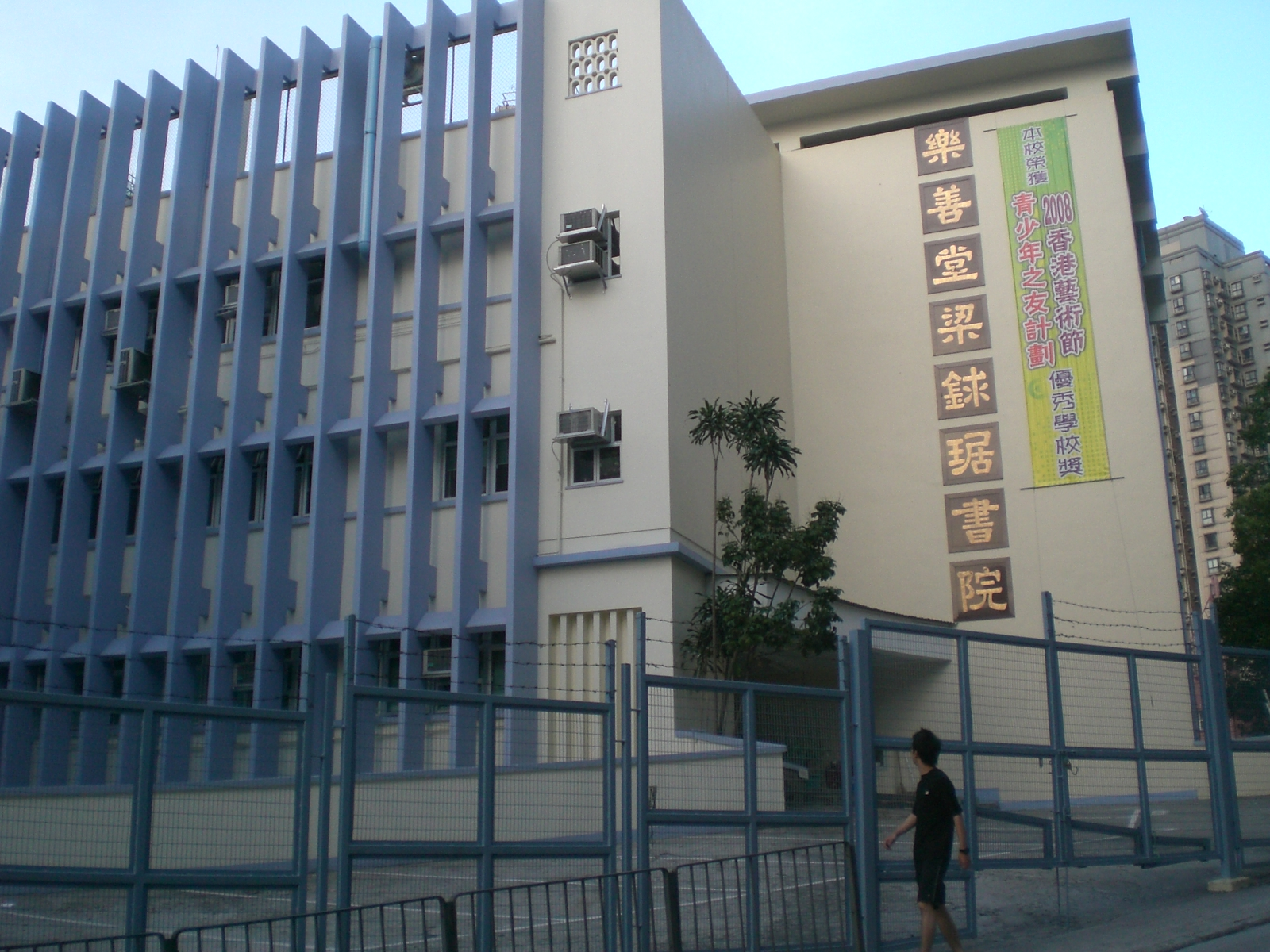 樂善堂梁銶琚書院, 醫院道